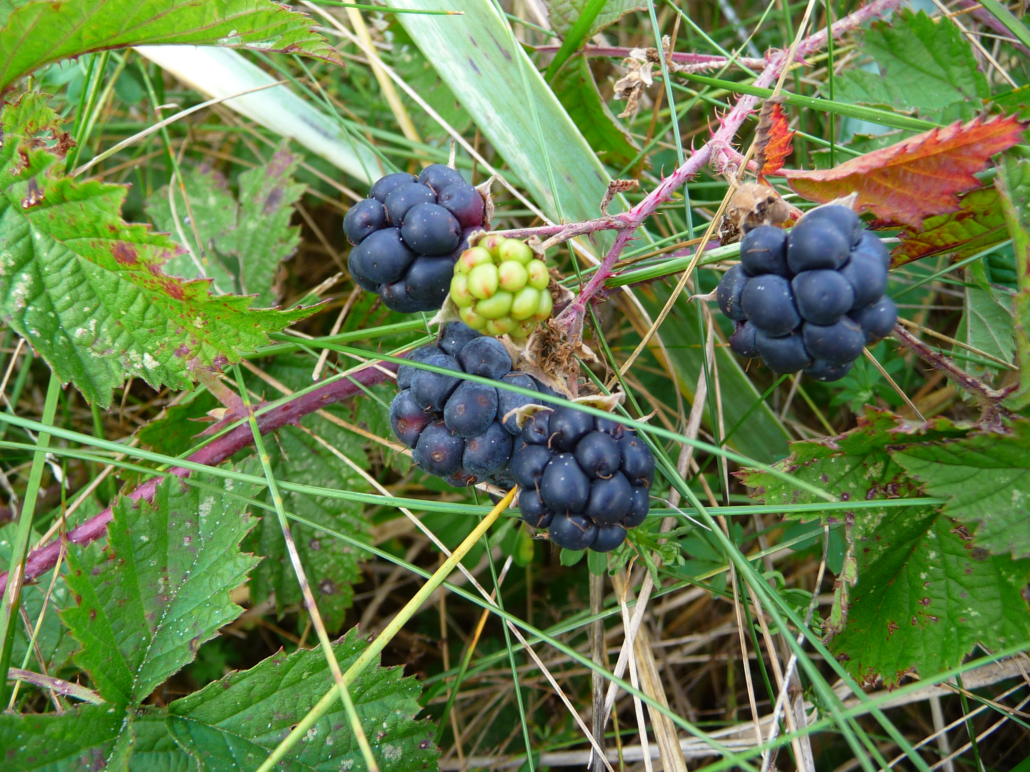 Kratzbeeren (Rubus caesius), fotografiert auf der ostfriesischen Nordseeinsel Juist (Niedersachsen, Deutschland)